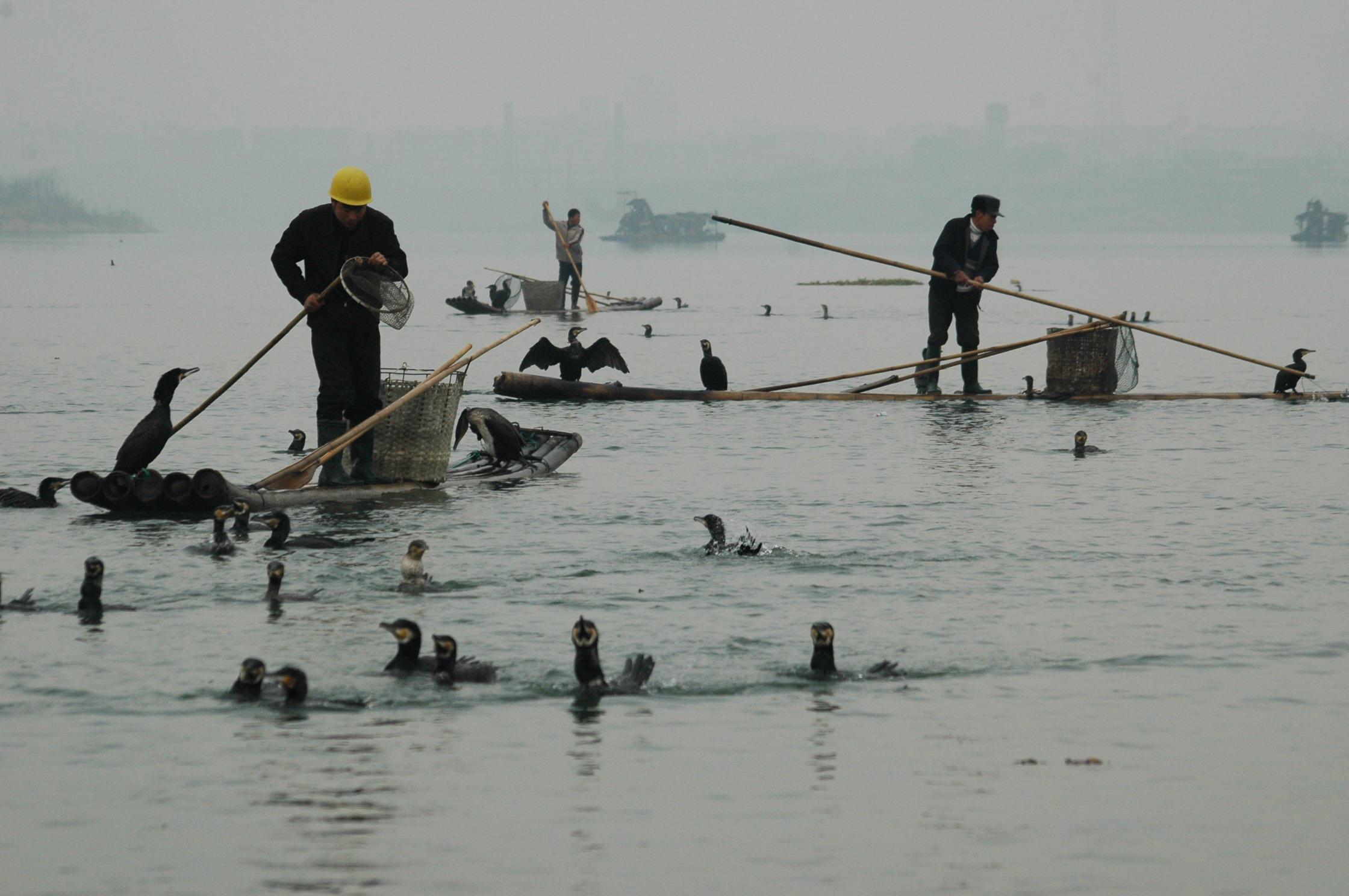 中国江西省鄱阳湖信江上的捕鱼人．